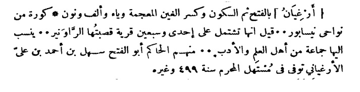 واژه ارغیان در کتاب معجم البلدان